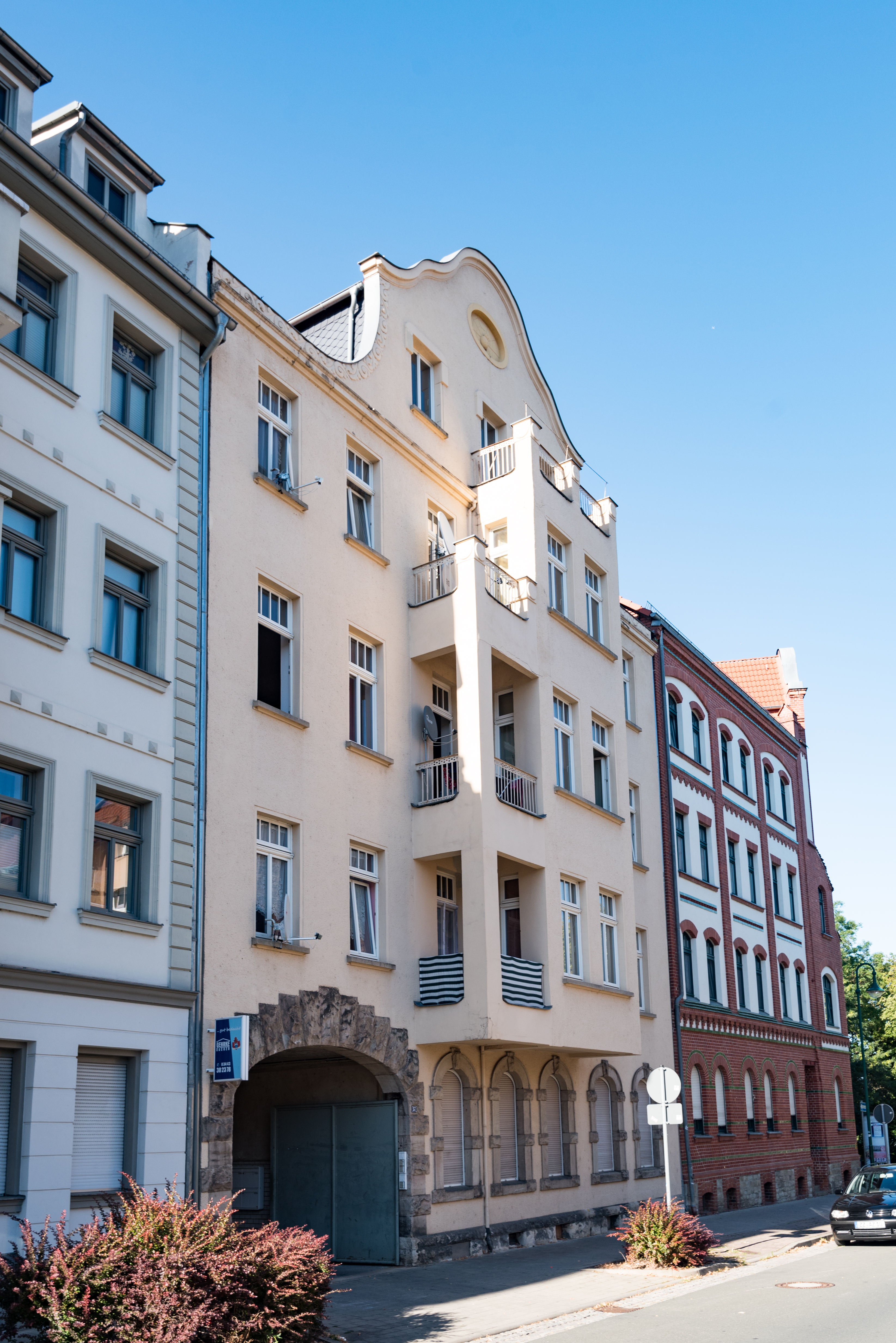 Weißenfels, Leopold-Kell-Straße 57